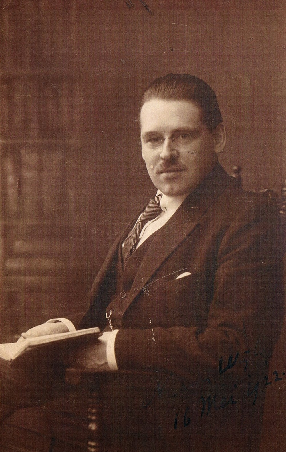 Nicolaas van Wijk, met handtekening, gedateerd 22 mei 1922. Op achterkant: 'Atelier Ziegler / Nieuwe Markt, 9, Zwolle / Telephon 767.' Foto Collectie Jan Paul Hinrichs